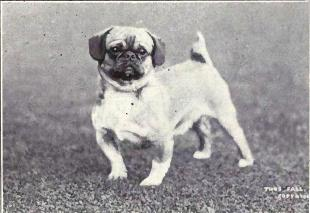 Happa from 1915